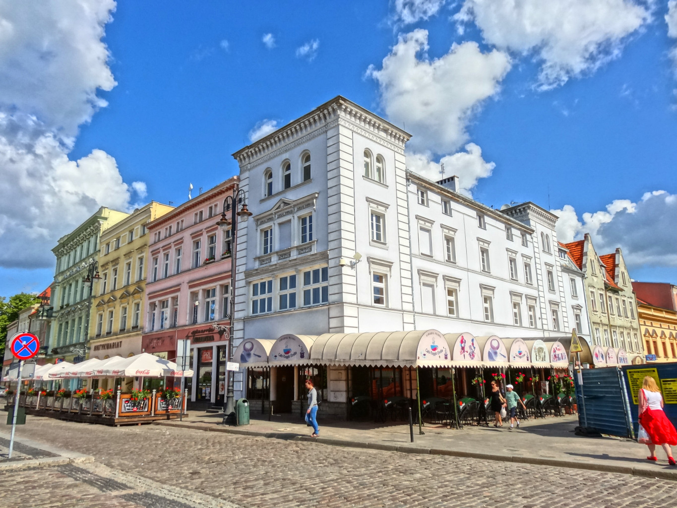 Północna pierzeja Starego Rynku w Bydgoszczy